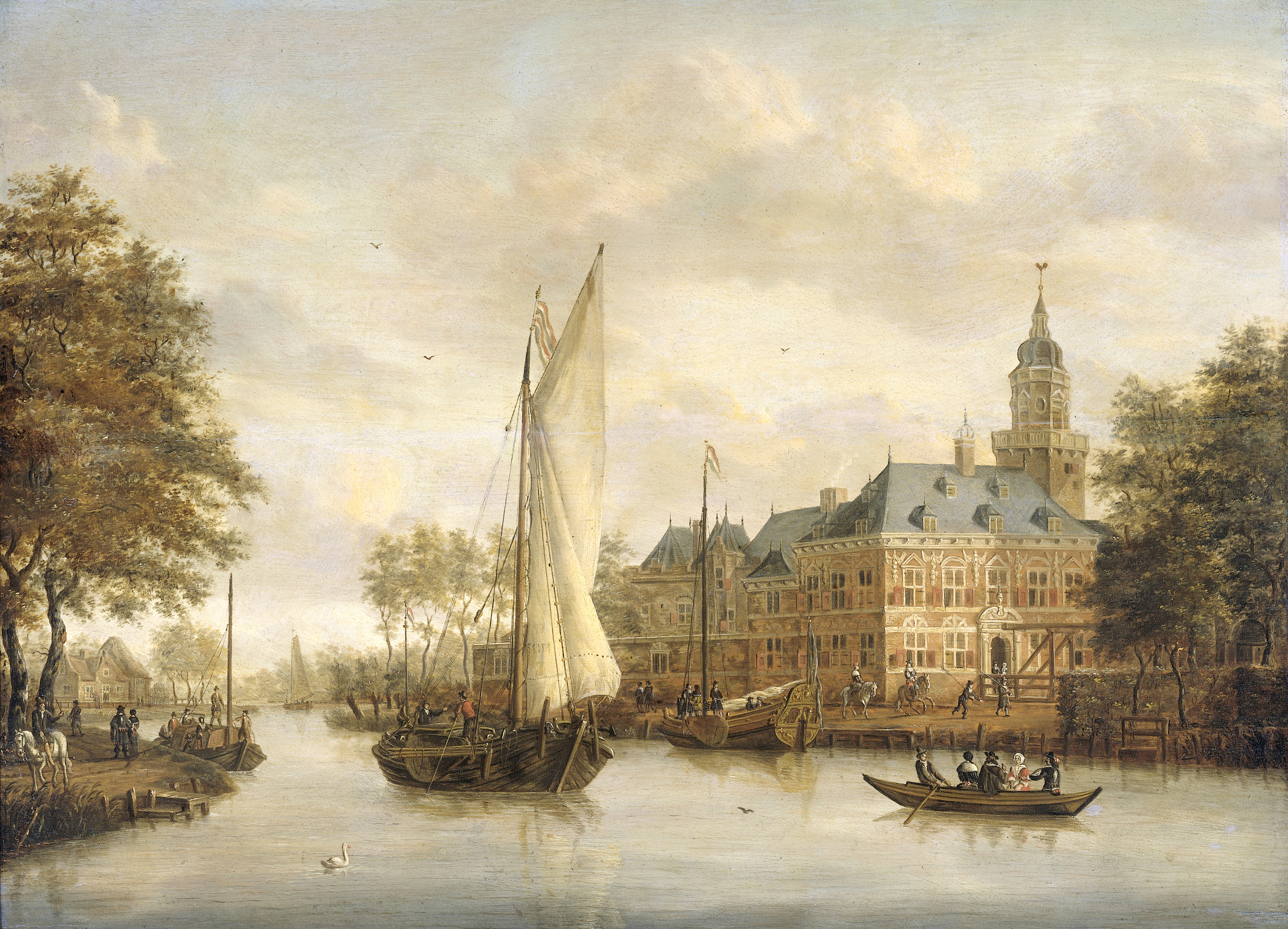 Het kasteel Nijenrode aan de Vecht bij Breukelen. Een jacht ligt bij het kasteel aangemeerd. Op het water van de Vecht een schuit en een roeiboot, links een trekschuit.